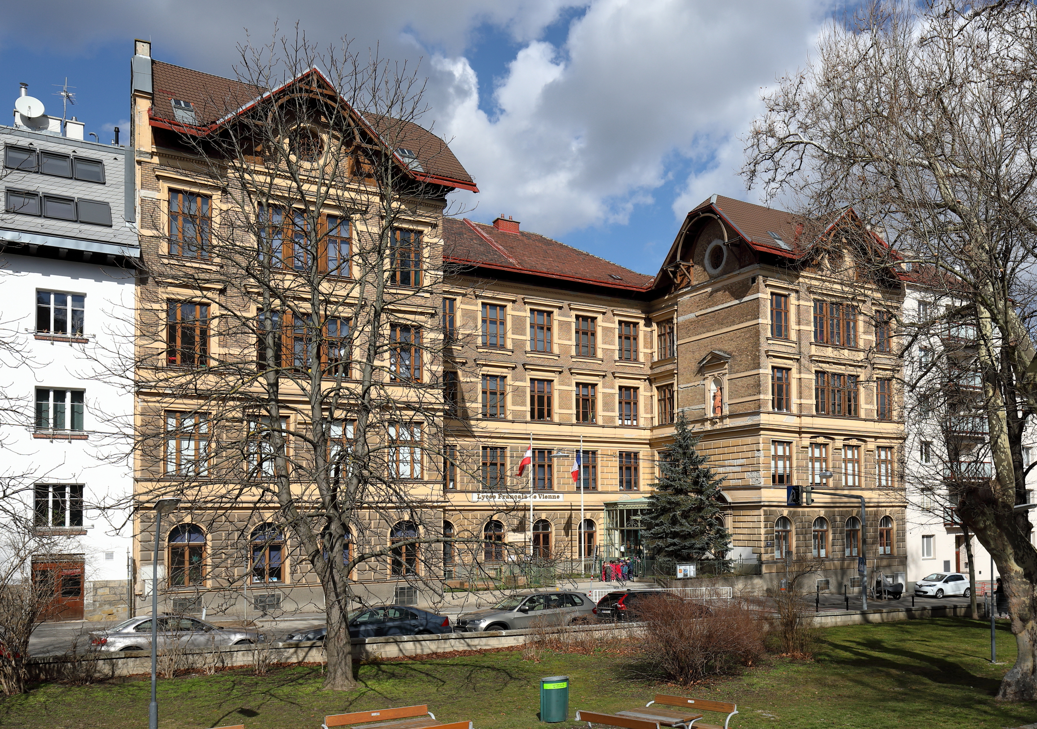 Das Lycée Français de Vienne an der Adresse Grinzinger Straße 95 im 19. Wiener Gemeindebezirk Döbling.Das Gebäude im Stil des Historismus wurde 1895 für eine Bürgerschule errichtet. Von 1949 bis 1972 wurde es als "Haus der Jugend - Canadaheim" für die Nachmittagsbetreuung von 6 bis 14jähriger Schülern genutzt. Im Jahr 1984 hat das Lycée in dem Gebäude einen Kindergarten eröffnet und nutzt es aktuell (2018) als Kindergarten und Volksschule.